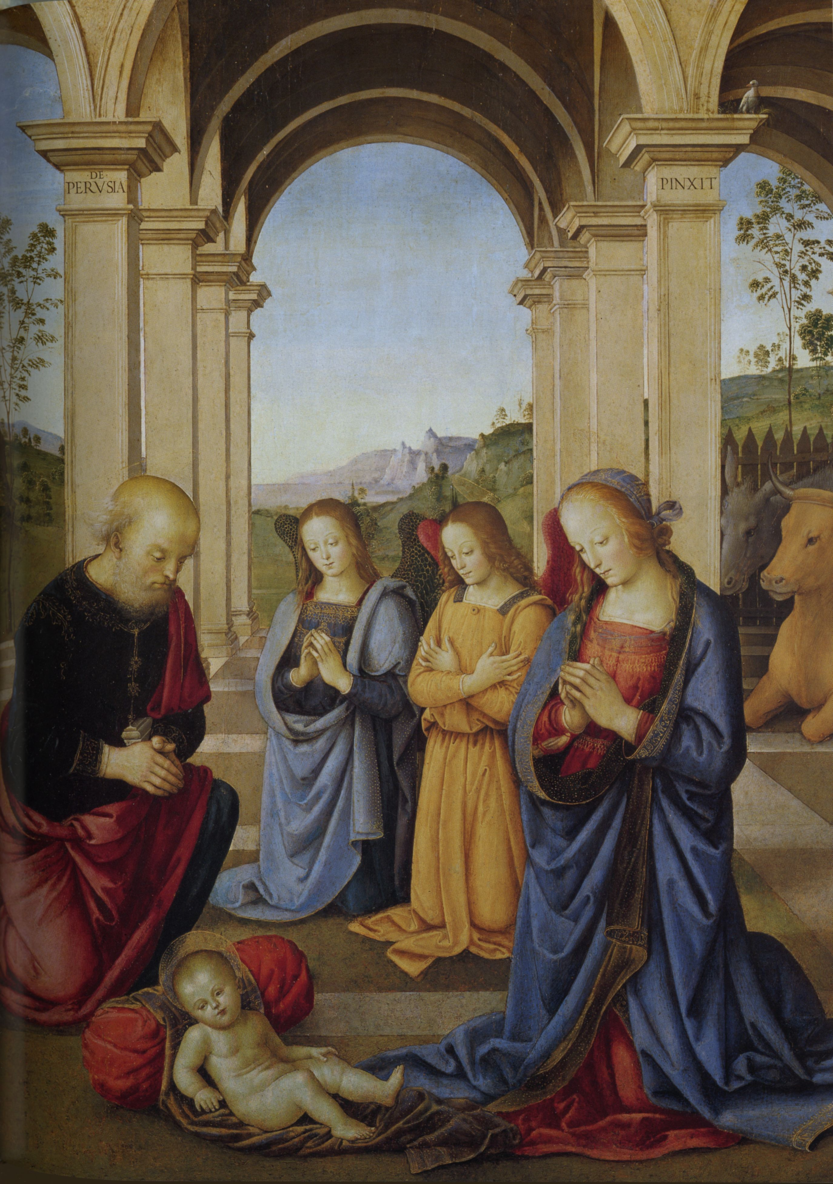 Pietro Perugino: Polittico Albani Torlonia. (detail/particolare) Cat. no. 28 in Vittoria Garibaldi: Perugino. Catalogo completo. Octavo, Firenze 2000, ISBN 88-8030-091-1